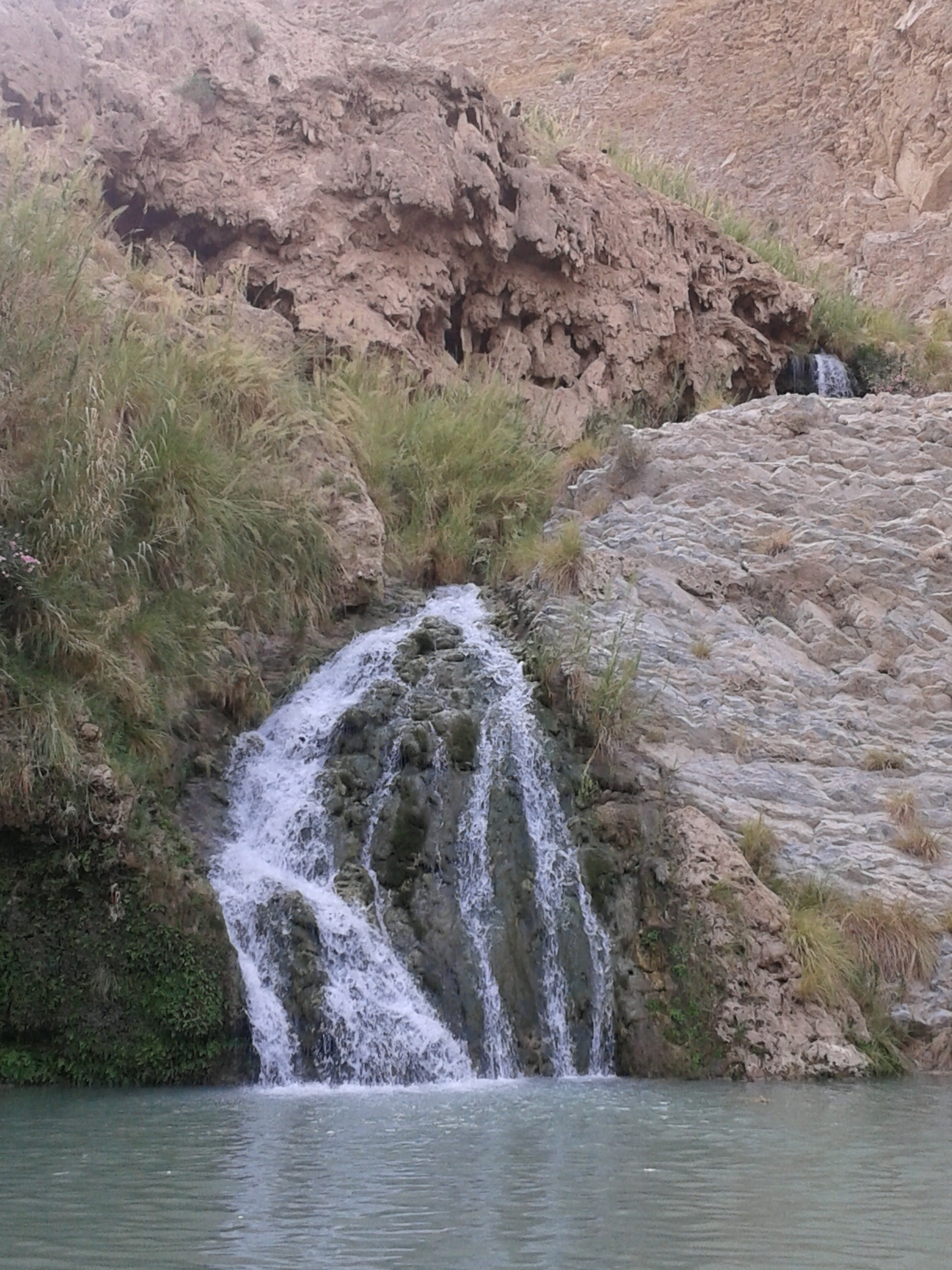 Pir Ghaib